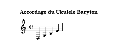 accord pour chacune des cordes du ukulélé baryton de haut en bas, de la quatrième à la première corde.